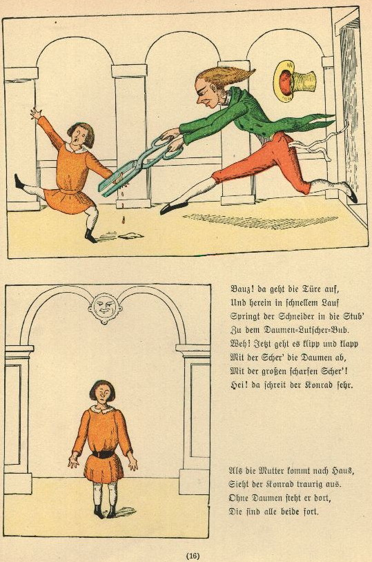 Der Struwwelpeter: Die Geschichte vom Daumenlutscher Tafel 2